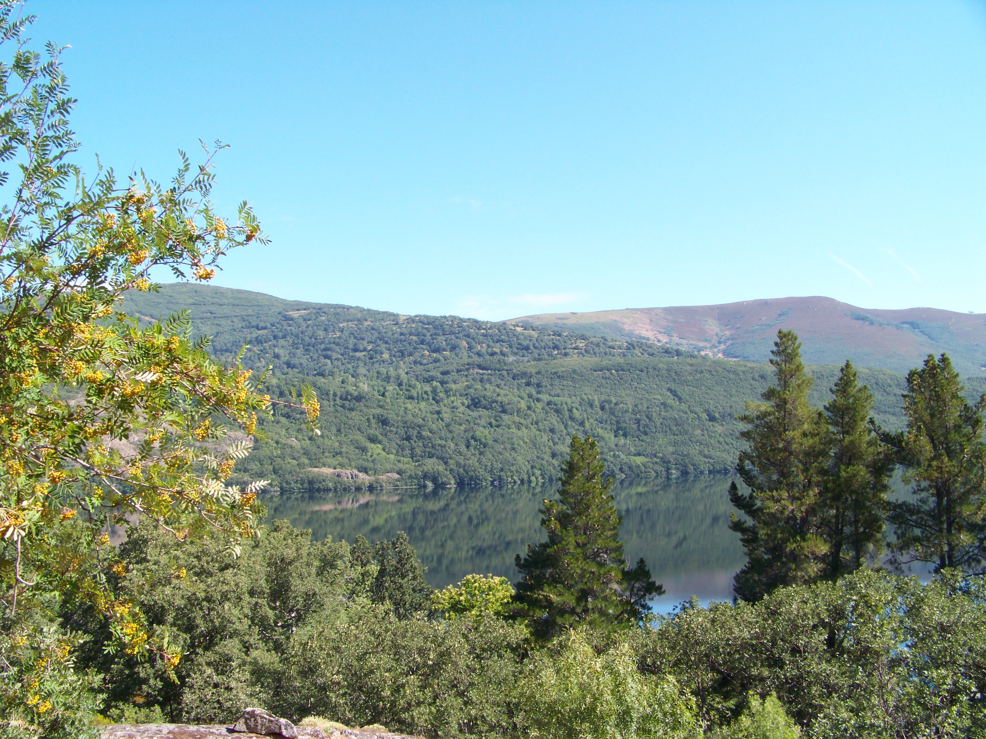 Lago de Sanabria y alrededores This is a photography of a Special Area of Conservation in Spain with the ID: ES4190105. Natura2000 entry, EEA entry